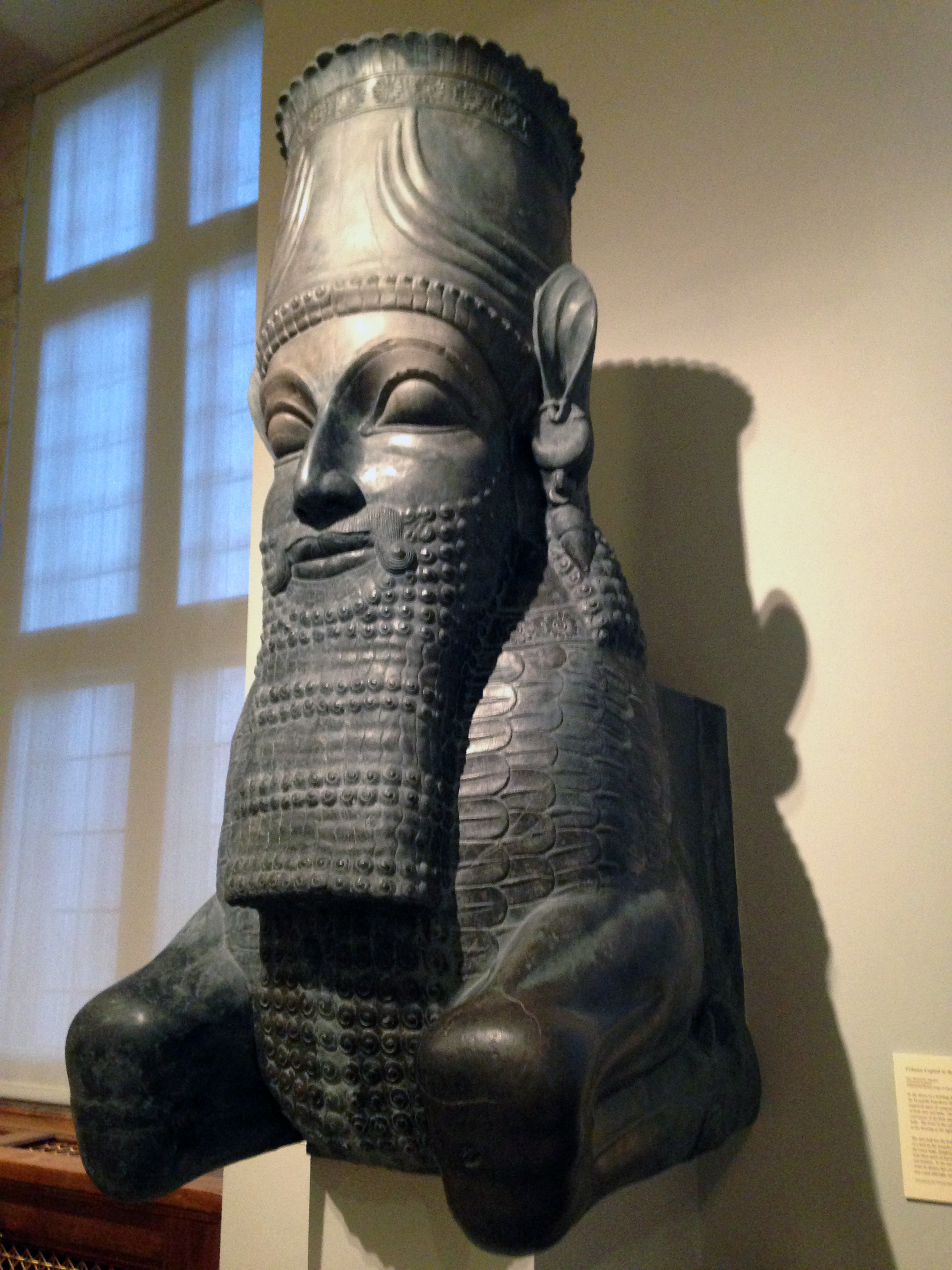 Column Capital in the form of a Man-Bull. Persepolis, Tripylon. Limestone, restored. Achaemenid period, Xerxes era (486-465BCE)